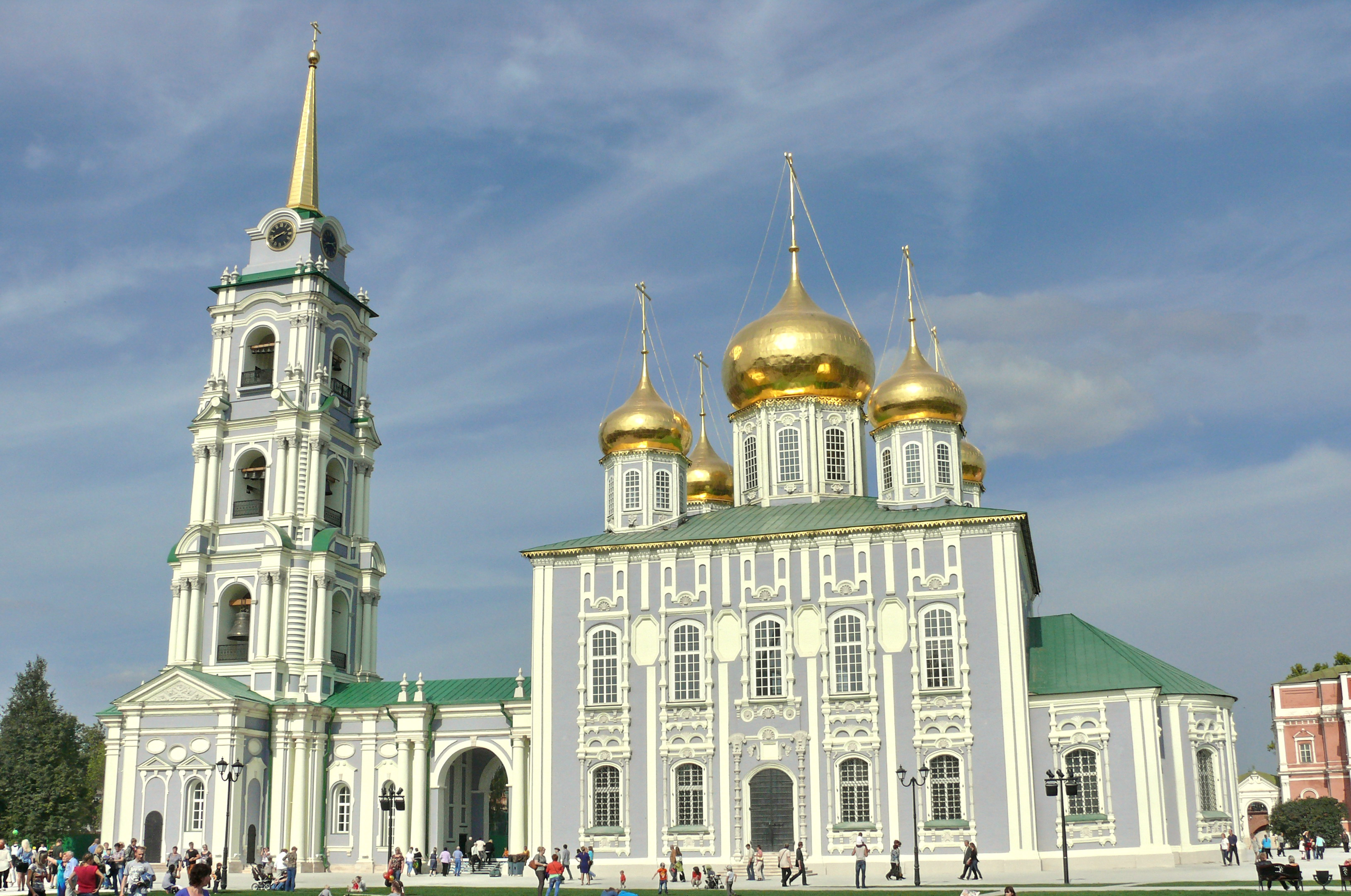 Собор Успенский (Тульская область, Тула, Кремль, (лит. И, И[i]))